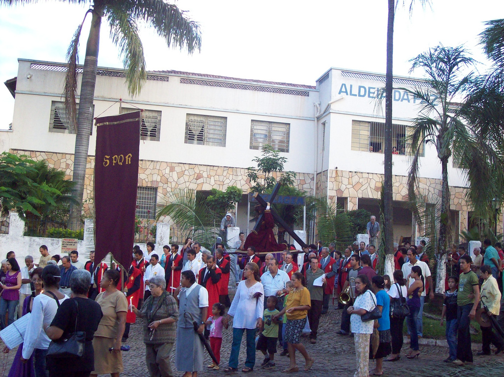 Procissão em Pirenópolis, Semana Santa, Procissão do Encontro saindo do Largo do Carmo.